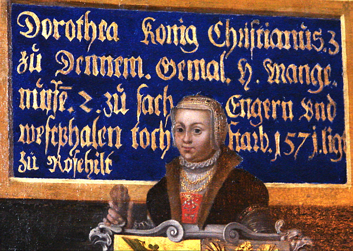 Dorothea af Sachsen-Lauenburg (1511—1571), dronning af Danmark og Norge. Detalje fra slægtstræ på Rosenborg Slot, København